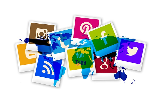 jpg foto símbolo redes sociales